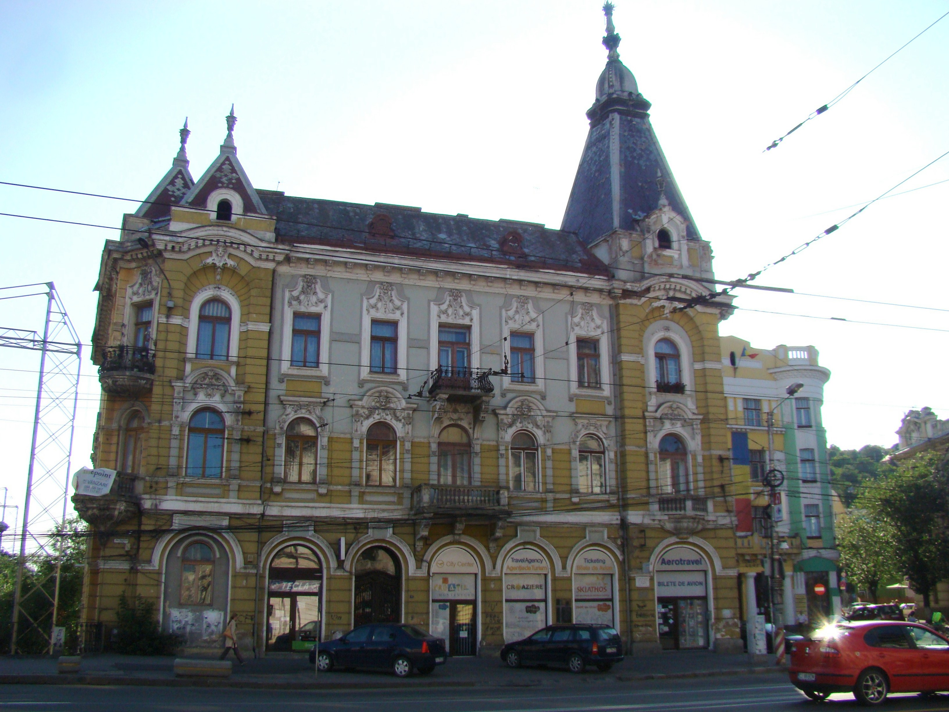 Palatul Berde din Cluj